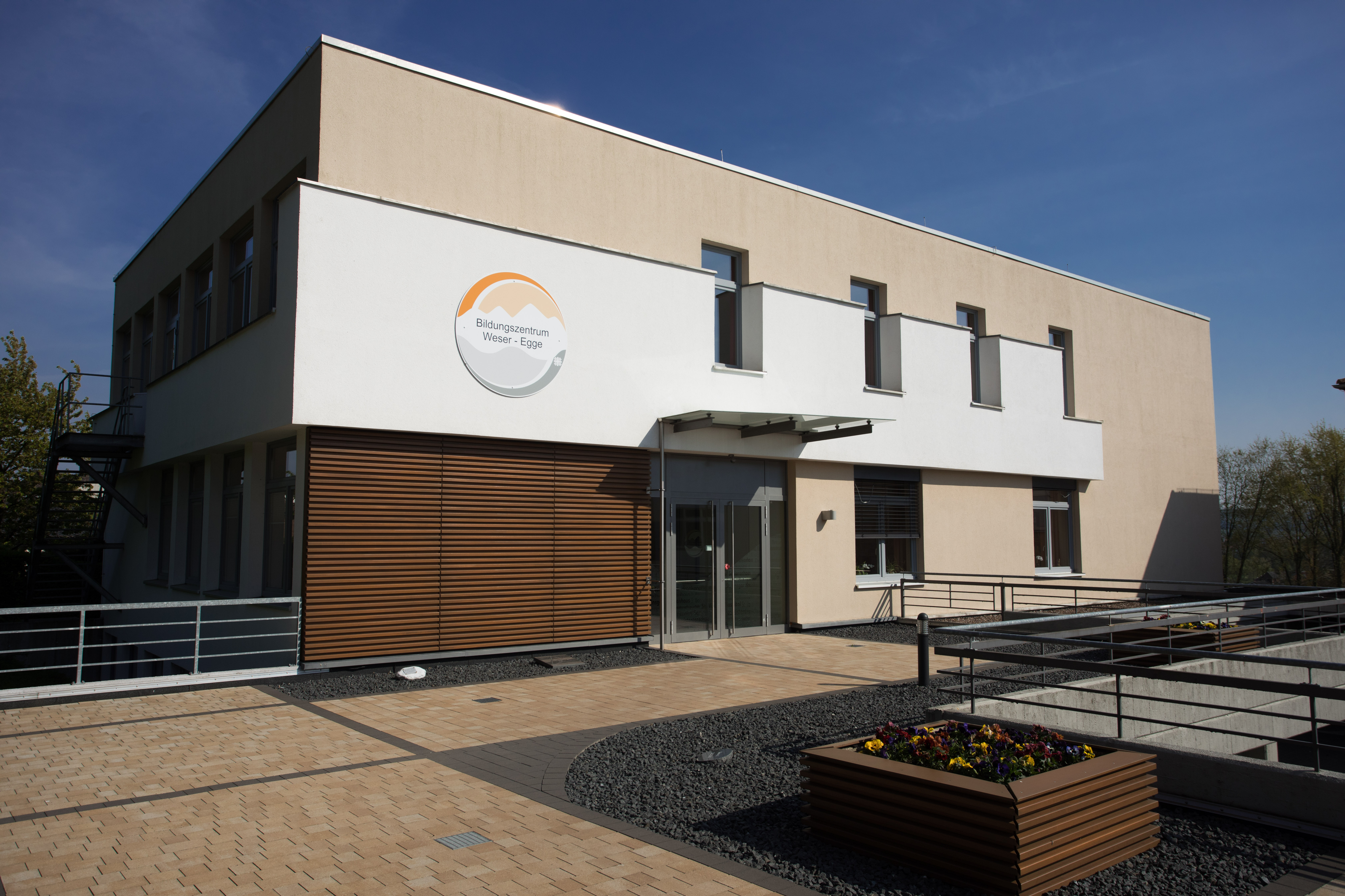 Das Bildungszentrum 2017; Standort Brakel